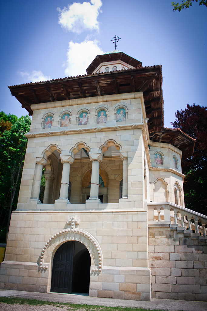 Capela Bratienilor Stefanesti 02